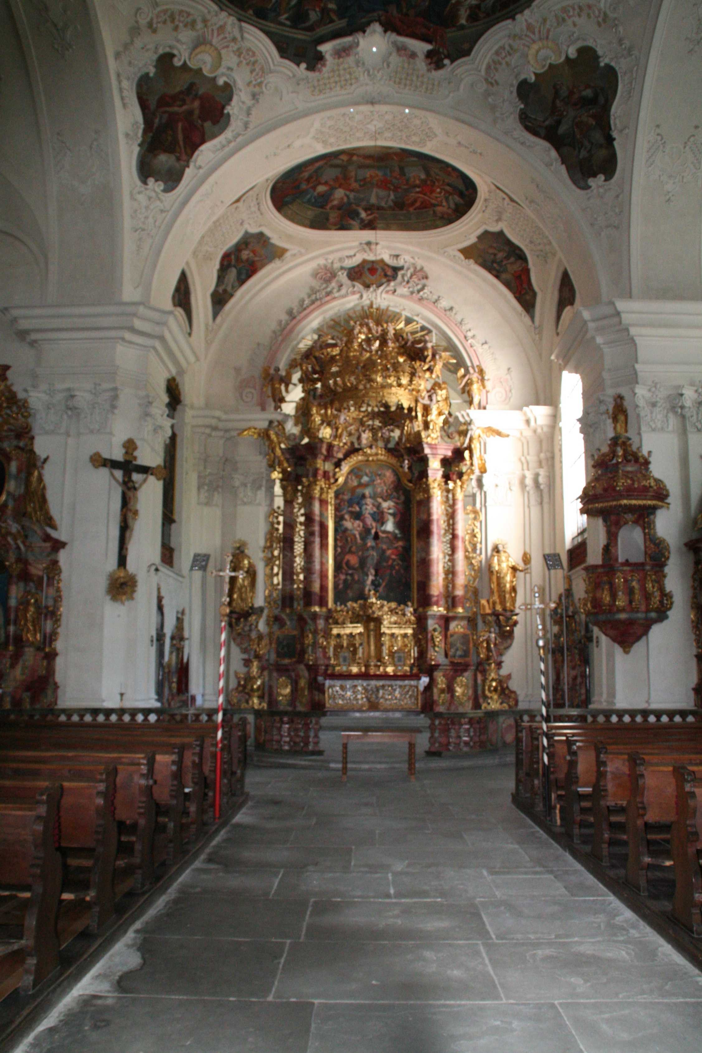 Kloster St. Katharinental in Diessenhofen TG Kirche innen